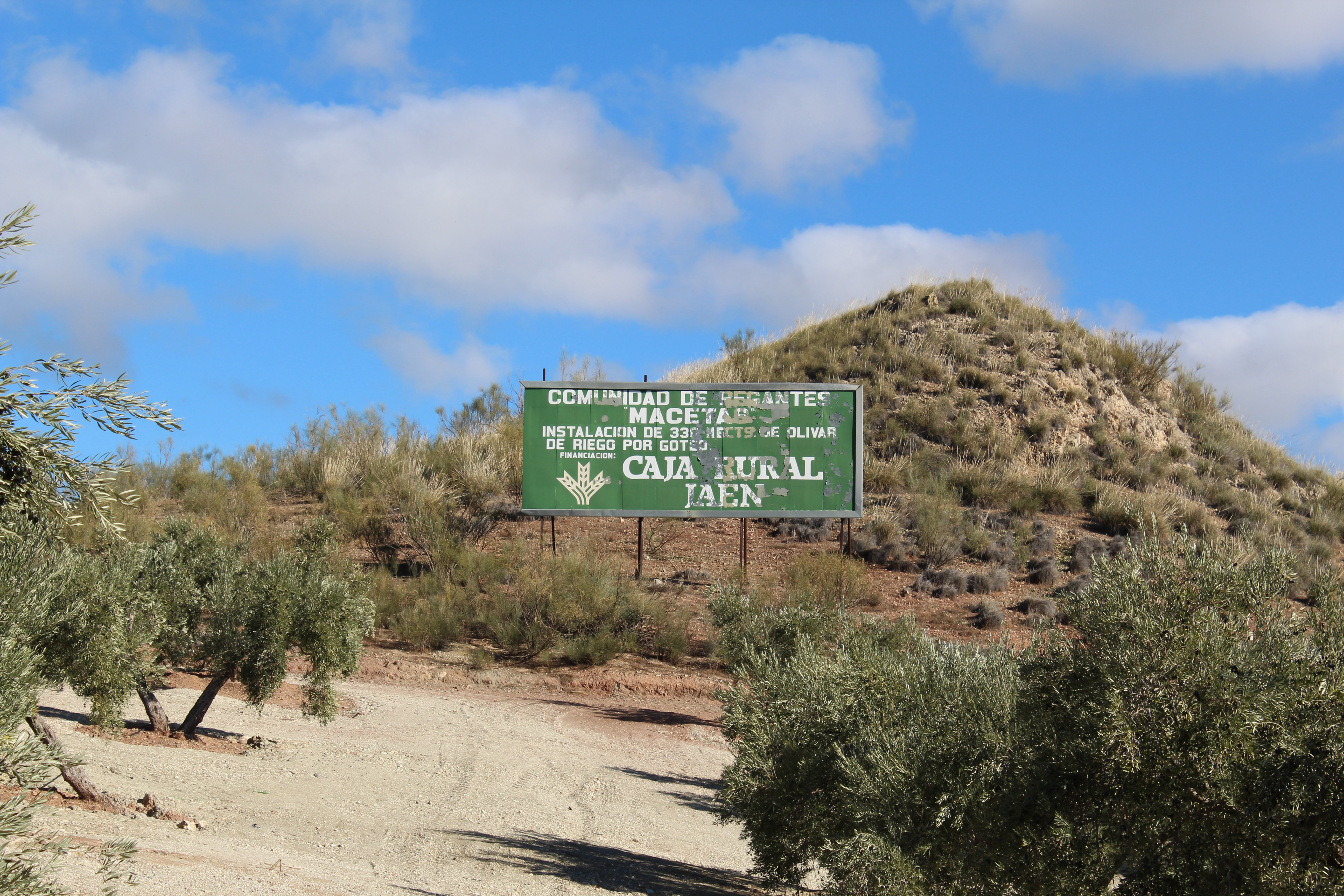 Vista del Cerro de Tallán, junto a la carretera de Jaén a Torrequebradilla. Sobre él, un cartel informativo de la Caja Rural de Jaén.